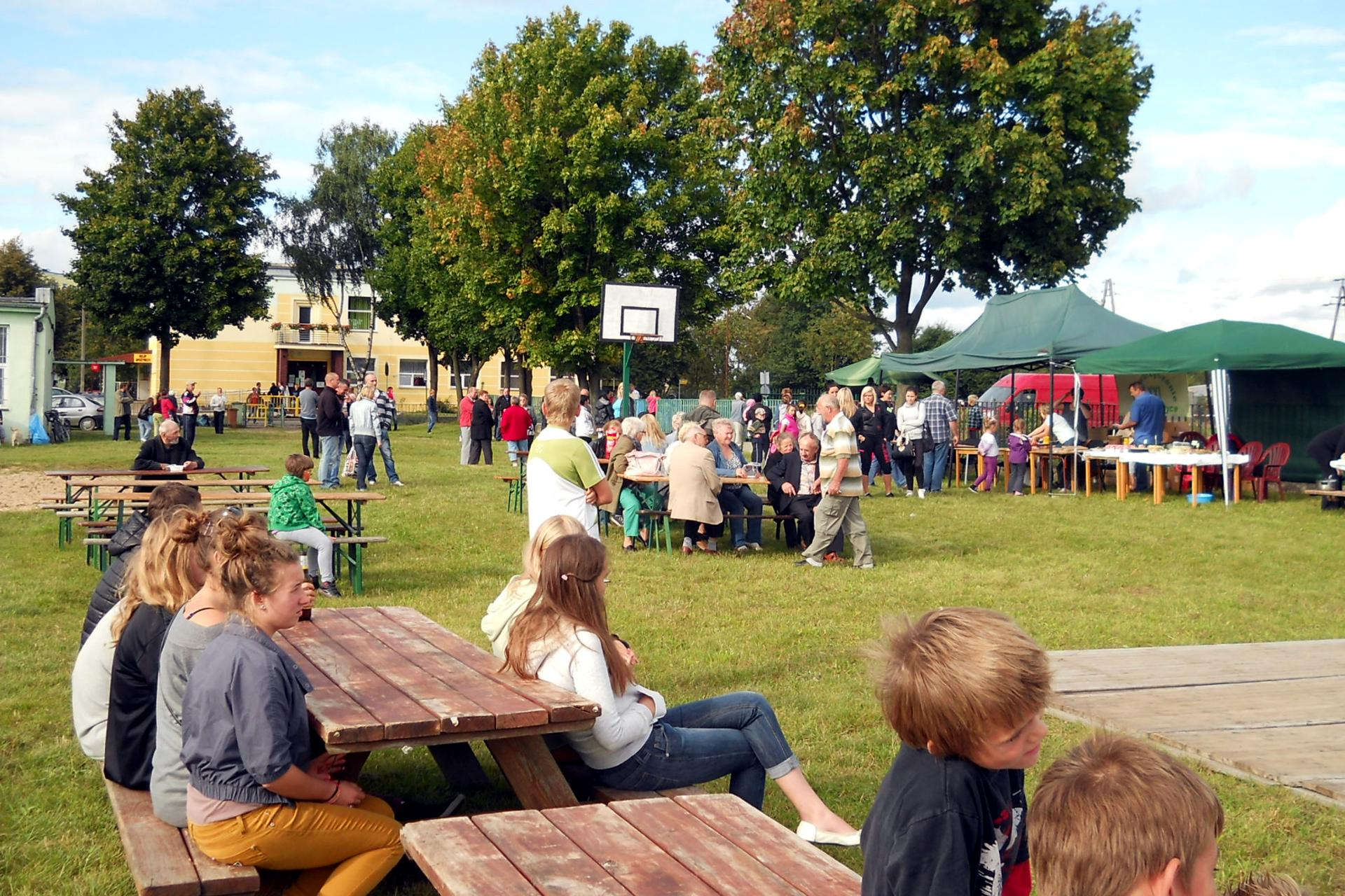 Święto Pieczonego Ziemniaka 2012 - festyn wiejski w Wojcieszycach